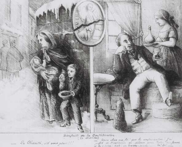 Bienfaits de la Confederation, Charles-Henri Moreau, 1865 « Cette caricature politique, tirée de l'éphémère journal satirique Le Perroquet, s'inspire de l'iconographie utilisée par les apôtres de la tempérance pour exprimer les réserves du directeur du journal envers le projet de confédération, qu'il décrit comme un divorce plutôt que comme un mariage. » – Peter Gossage et J.L. Little, Une histoire du Québec, Entre tradition et modernité, Les Éditions Hurtubise, Montréal, 2015, p. 146.